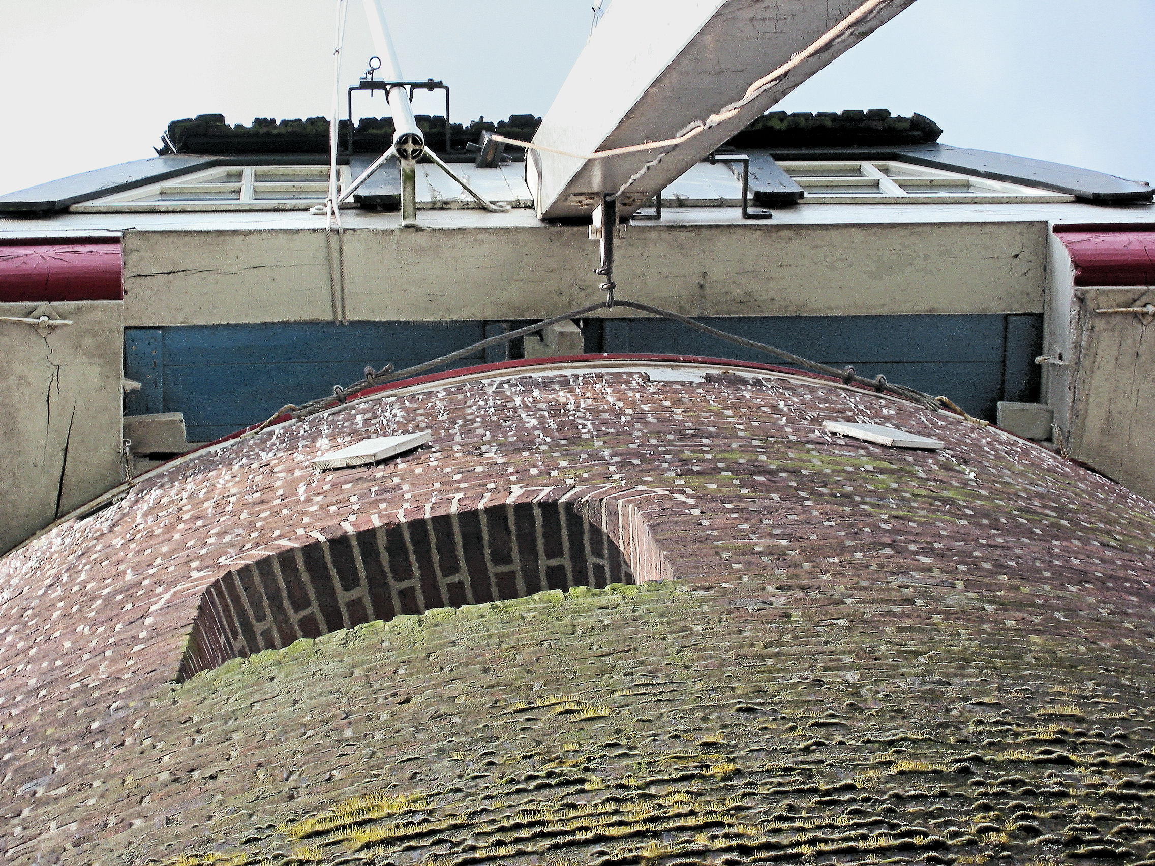 De Engel, kapvang, Varsseveld, Gelderland, the Netherlands